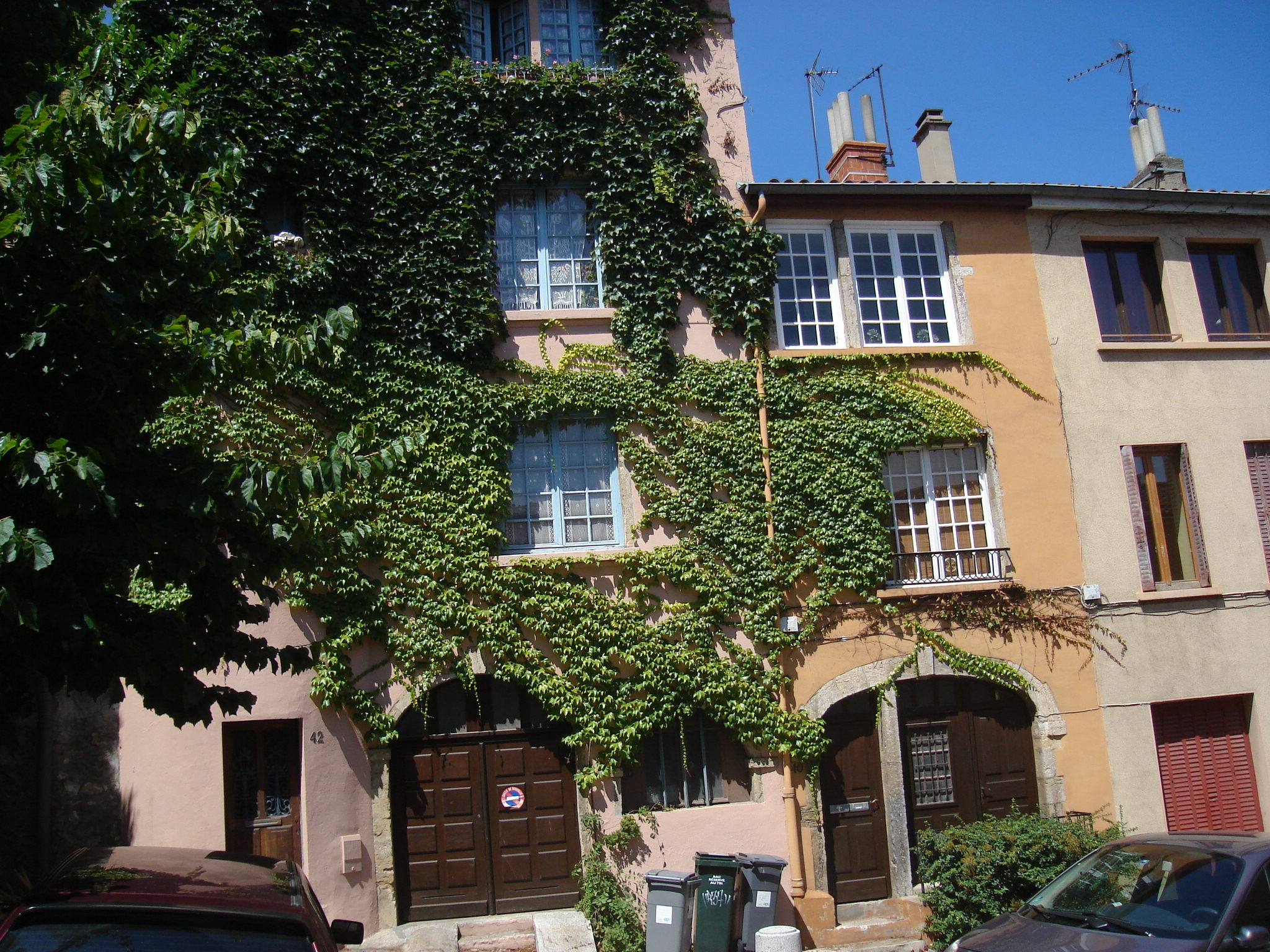 Montée du Gourguillon, Lyon